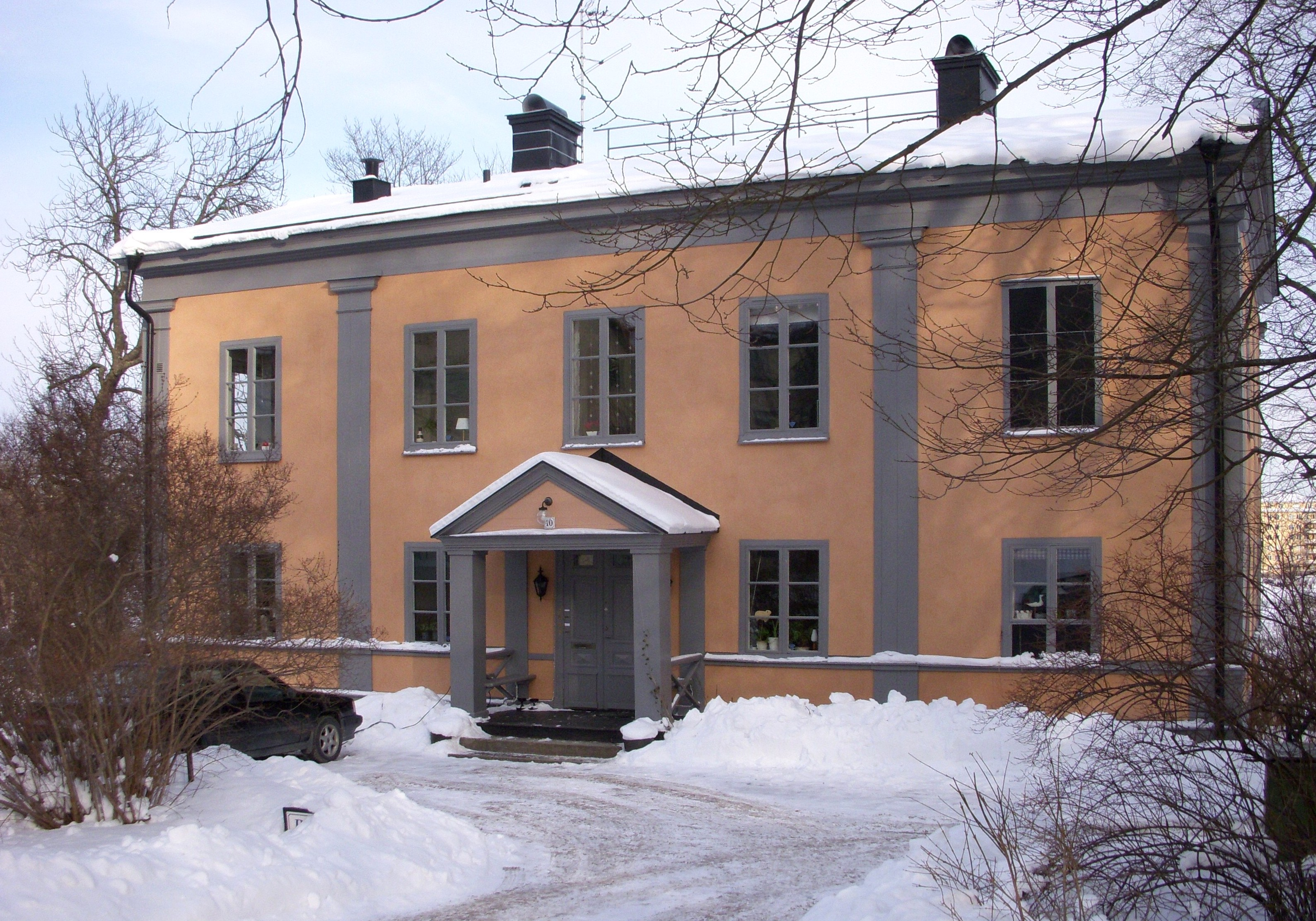 Tranebergs gård i februari 2011